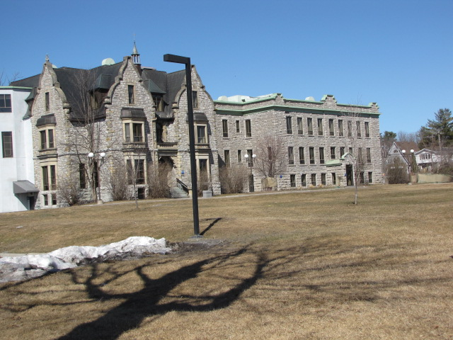 Photo de l'édifice du Conservatoire de musique de Gatineau sur le boul. Taché (secteur Hull)à Gatineau, Qc. en Outaouais- Photo: Canon PowerShot SX10 IS, 640x480, Truecolor, size: 133.5KB